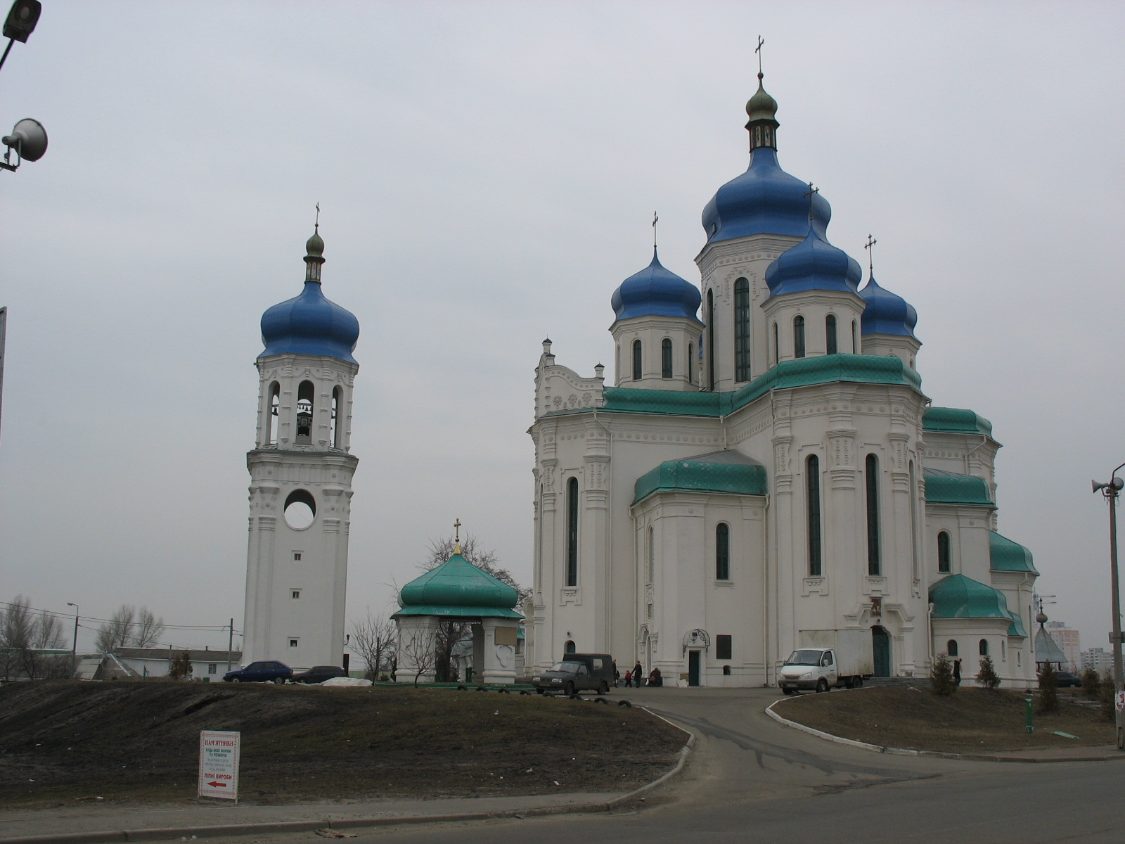 Троїцький собор на Троєщині, Київ УПЦ (МП)